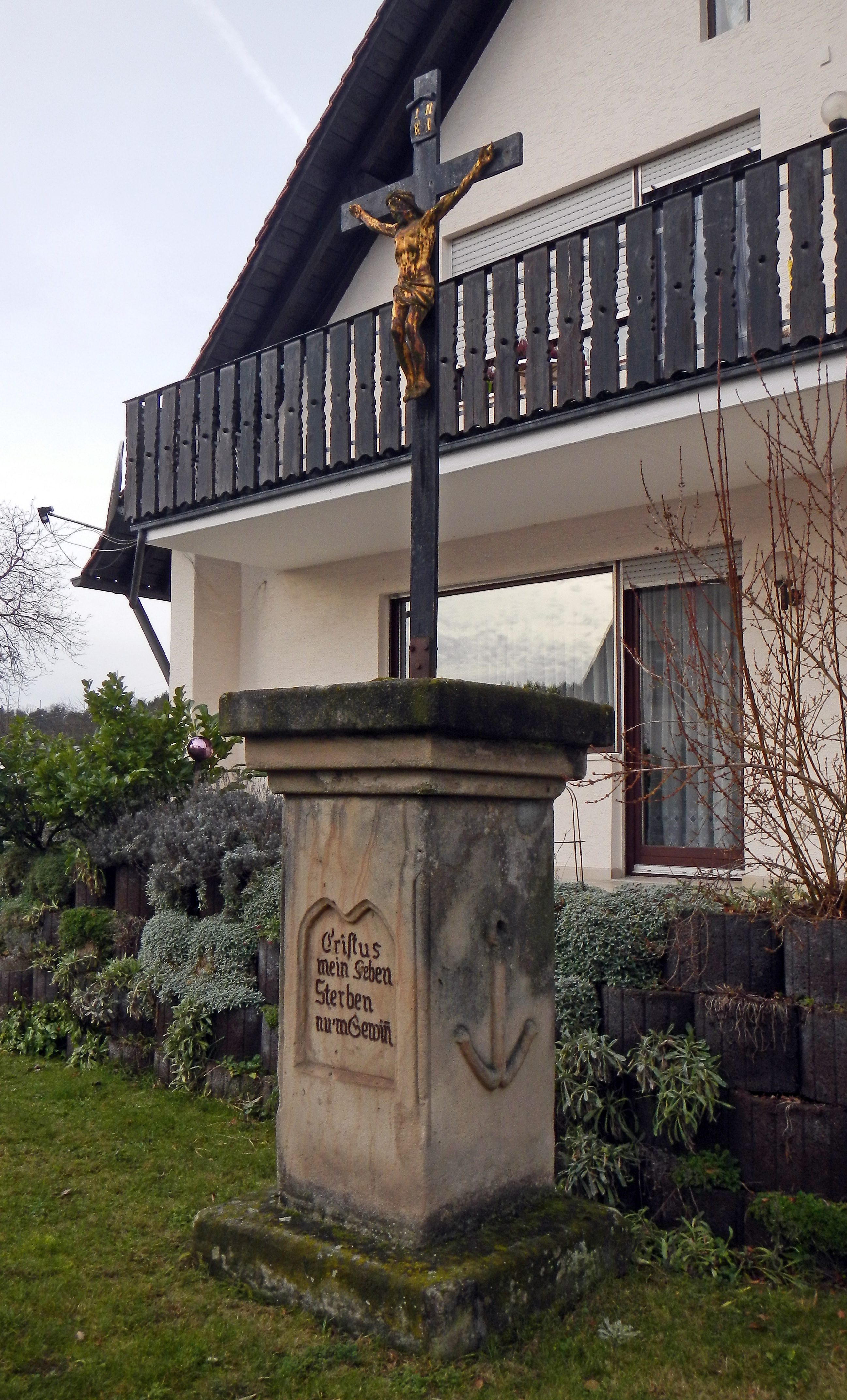 Gusseisenkreuz auf hohem Sandsteinsockel, 3. Viertel 19. Jahrhundert in Mittelmembach (Gemeinde Heßdorf) im Landkreis Erlangen-Höchstadt.